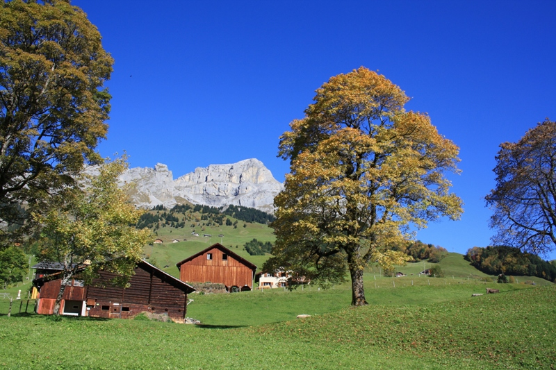 Herbststimmung im Schächental bei Unterschächen, Kanton Uri, Schweiz